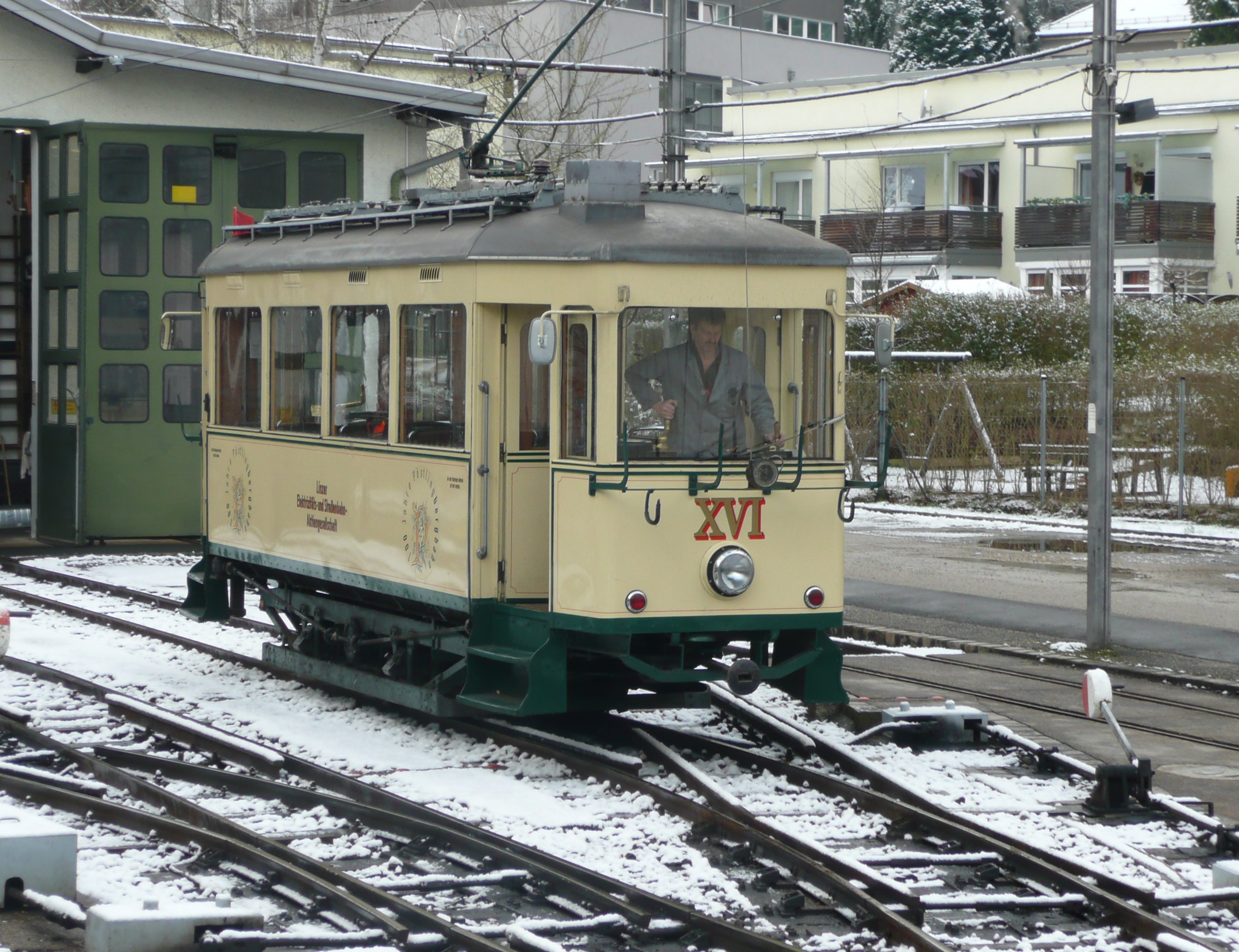 Triebwagen XVI der Pöstlingbergbahn bei der Ausfahrt aus der Remise